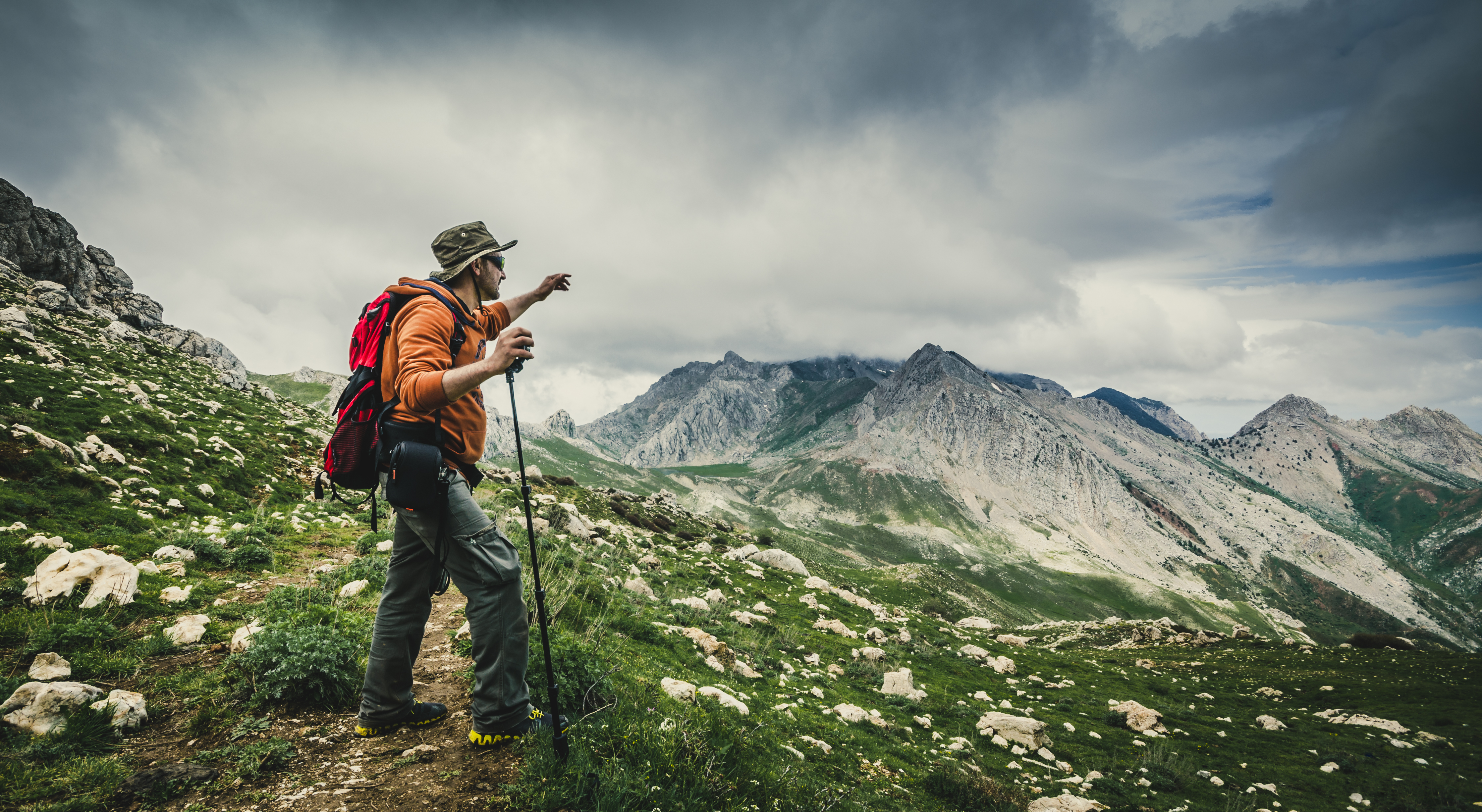 Un randonneur à 1700m dans le Djurdjura, pres du lac Agoulmim, à Tikejda en Algérie